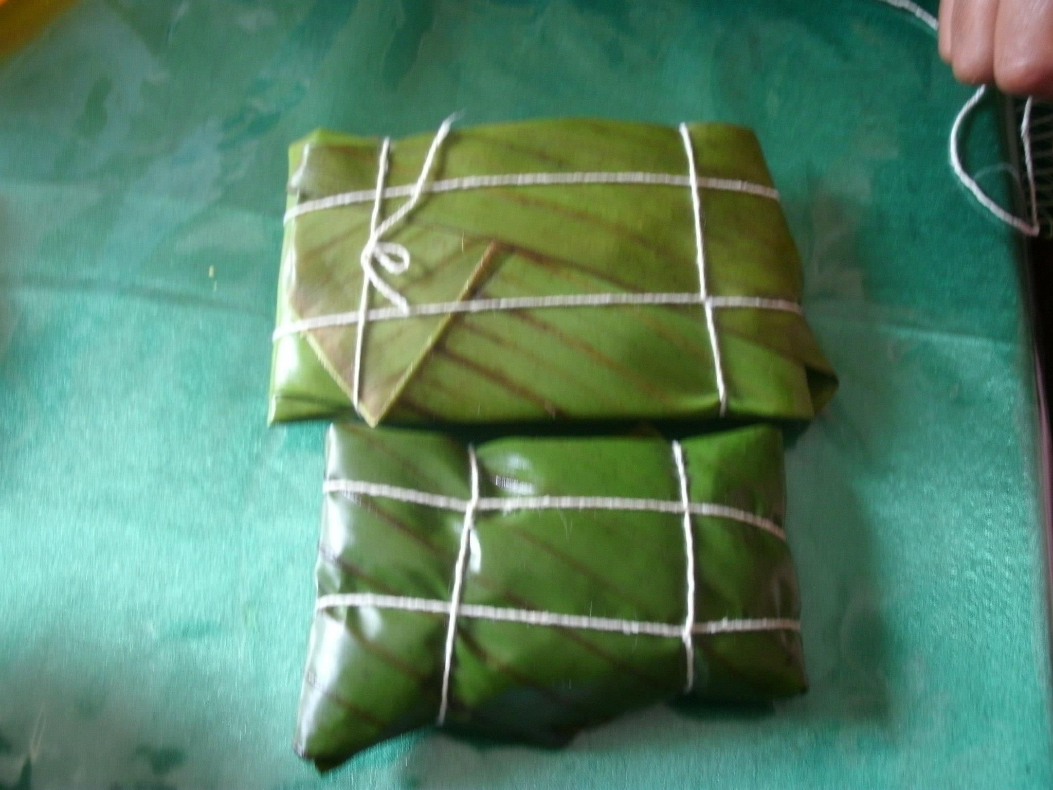 Las hallacas por cocinar